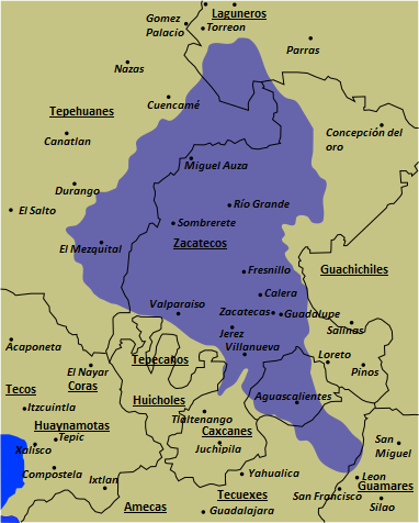 Mapa del territorio de los Zacatecos.